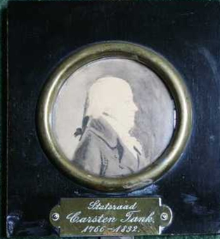 Portrett av Carsten Tank (1766-1832) Eier: Eidsvoll 1814